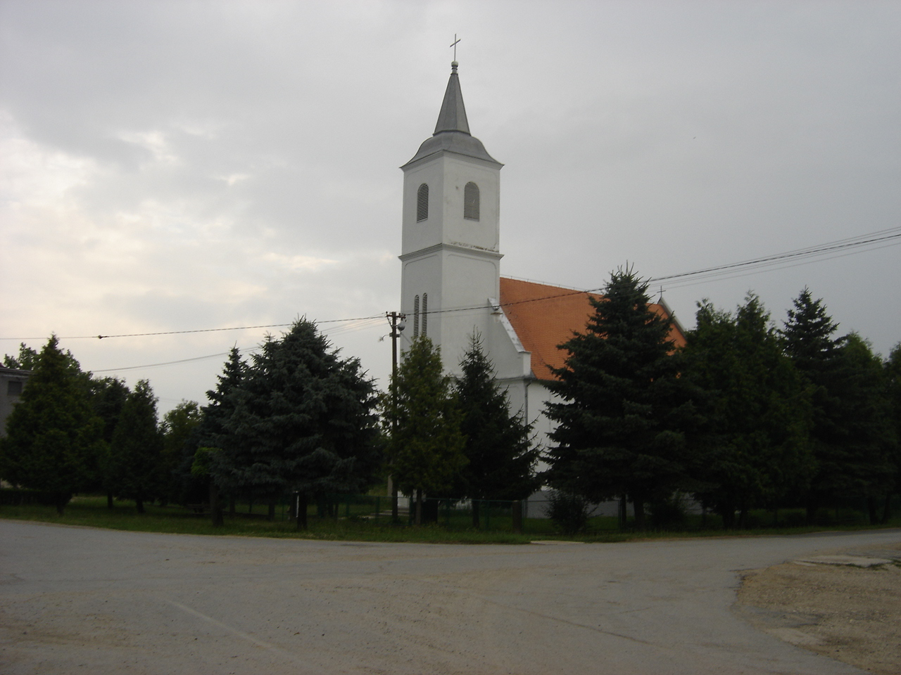 Novi Bezdan, crkva sv. Mihaela arkanđela